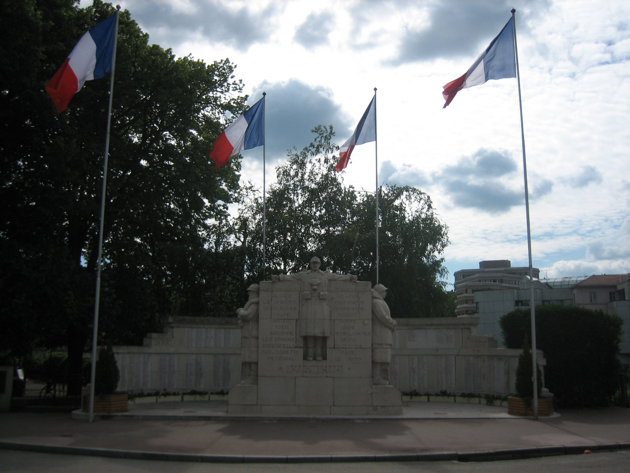 Monument aux morts de la première guerre mondiale à Épinal